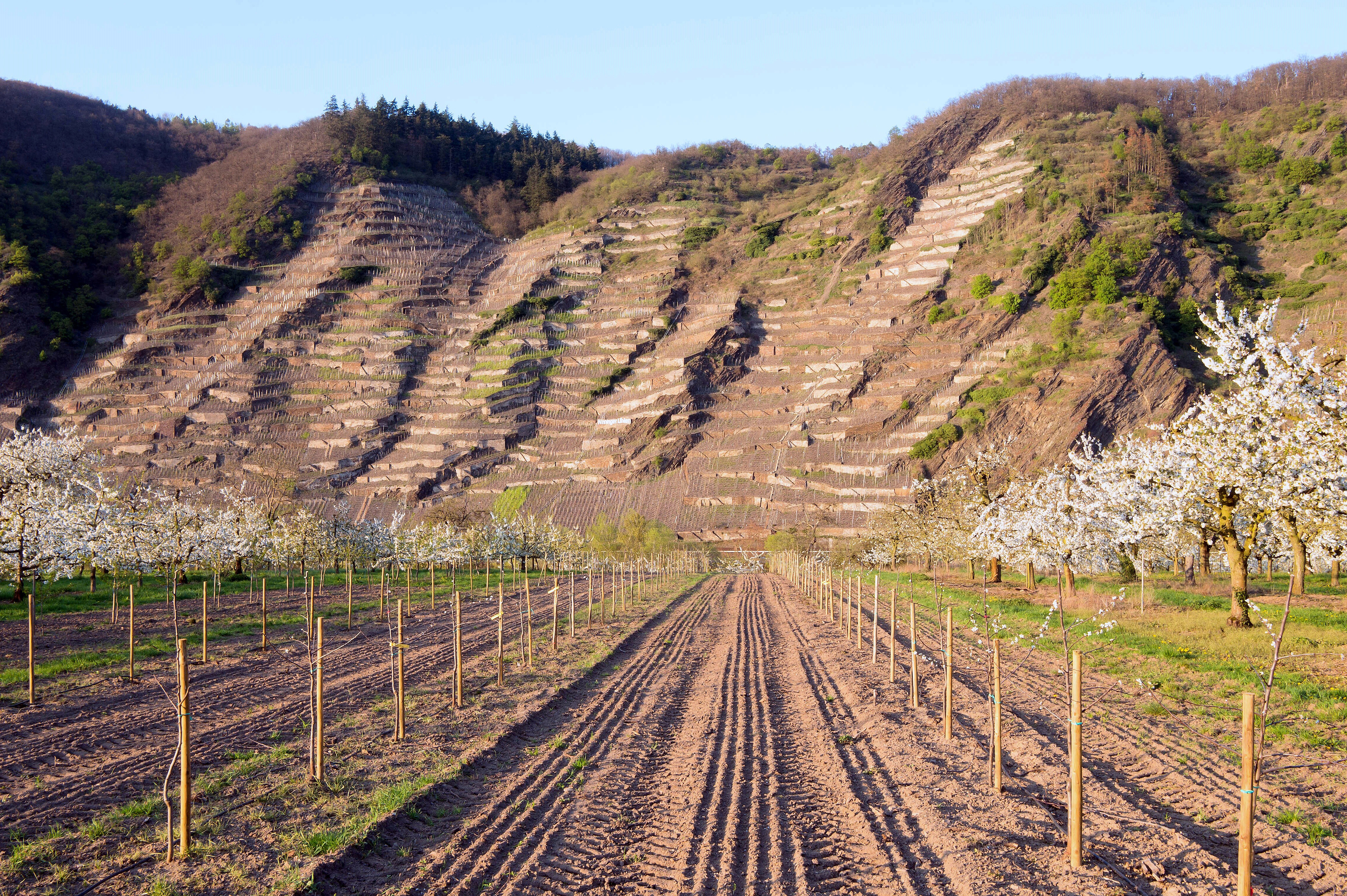 Die Steillagen des Winninger Uhlen kurz vor Austrieb der Reben; Blick von den Dieblicher Obstbaumwiesen zur Zeit der Kirschblüte.